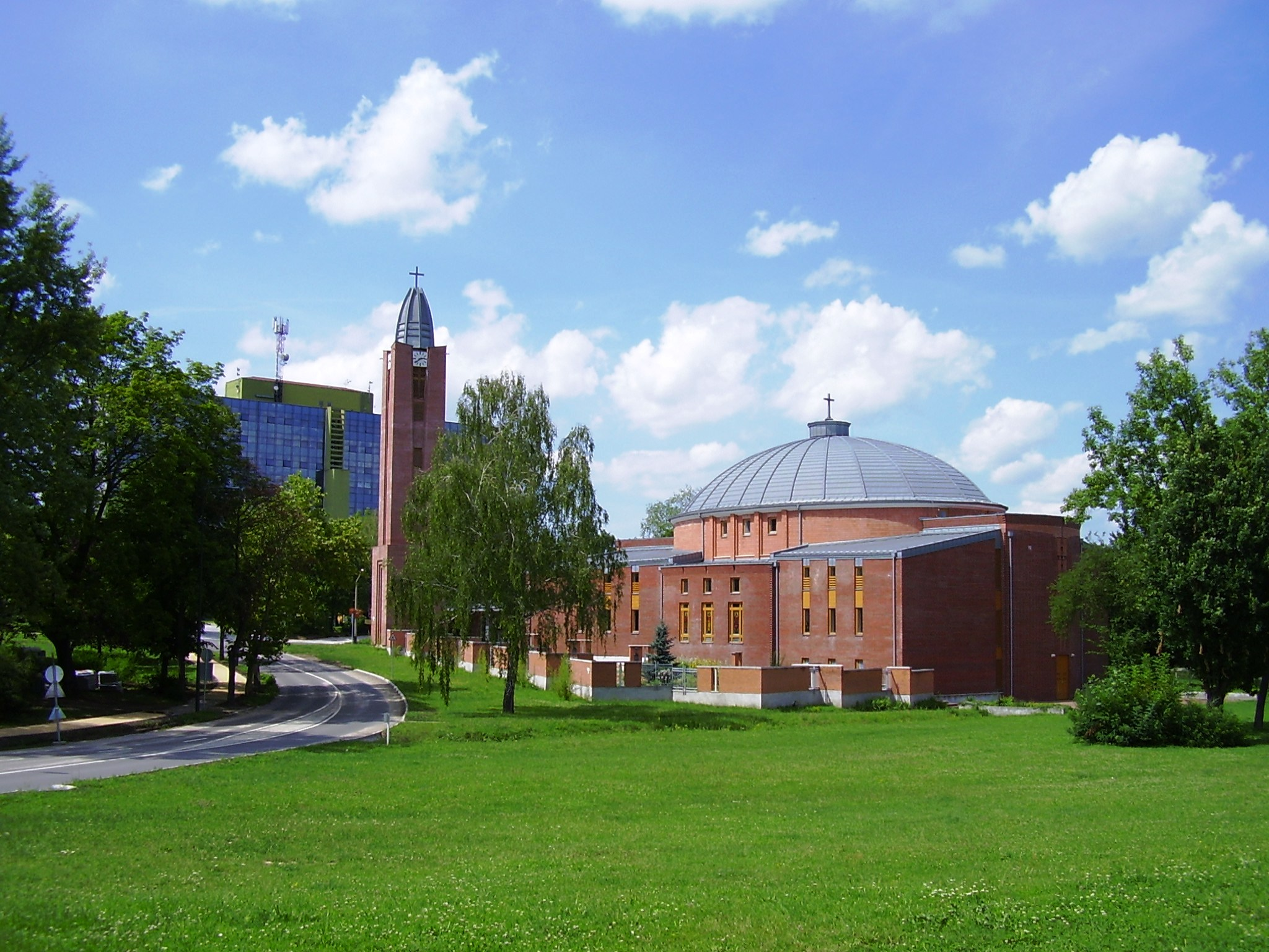 Szent Család római katolikus templom (Kazincbarcika)